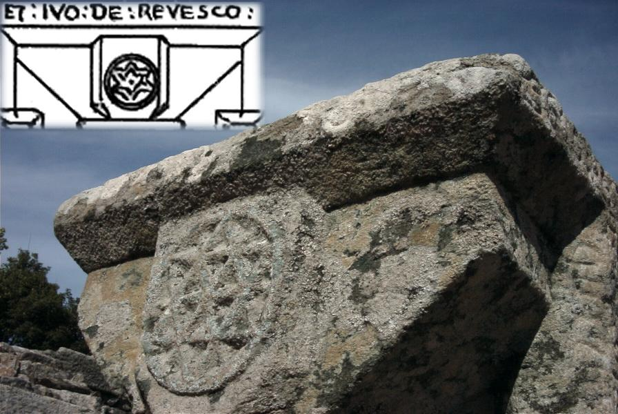 Chapelle de Languidou : inscription des commanditaires